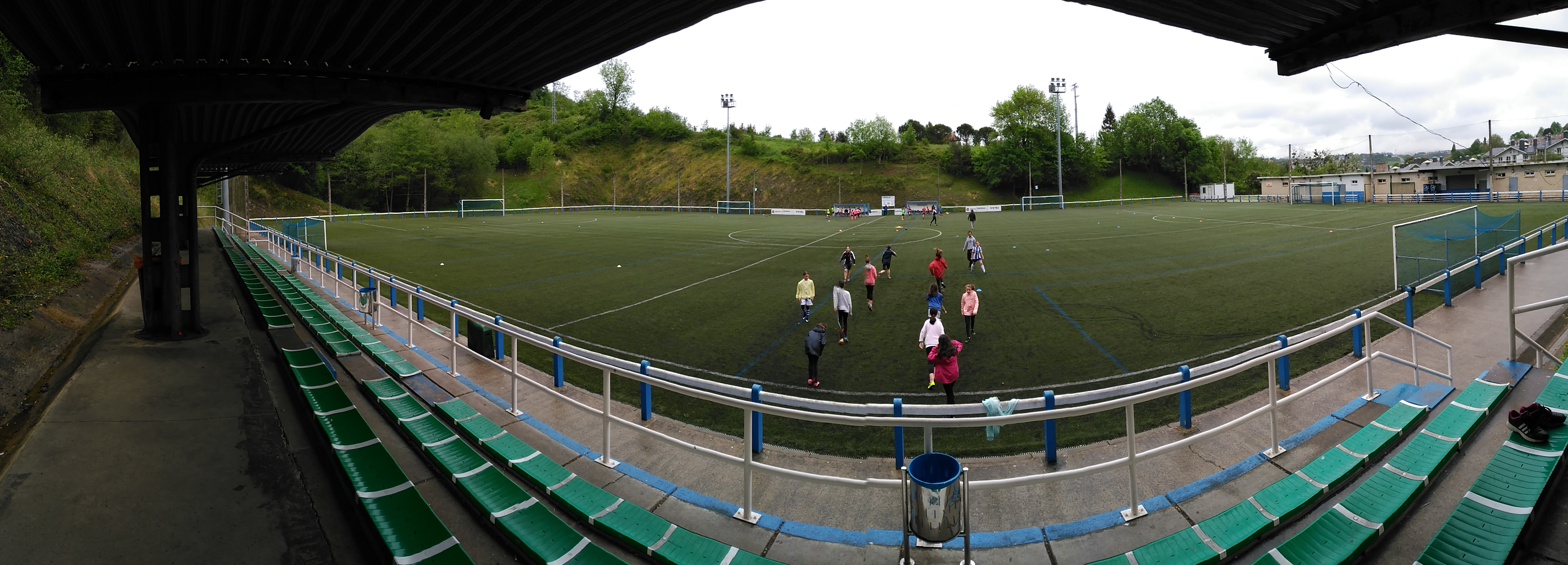 Berio futbol zelaia (futbol 11)